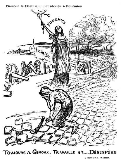 Démolir la Bastille... et aboutir à Fourmies Toujours à Genoux. Travaille et .... Désespère Dessin de A. Willette